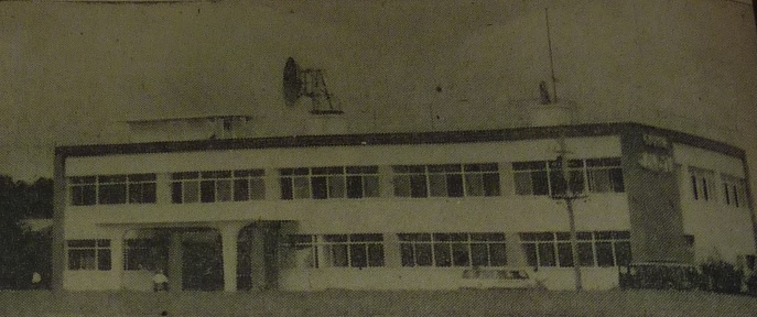 ラジオ宮崎（MRT宮崎放送）のテレビ開局時の本社屋（宮崎市下北方）